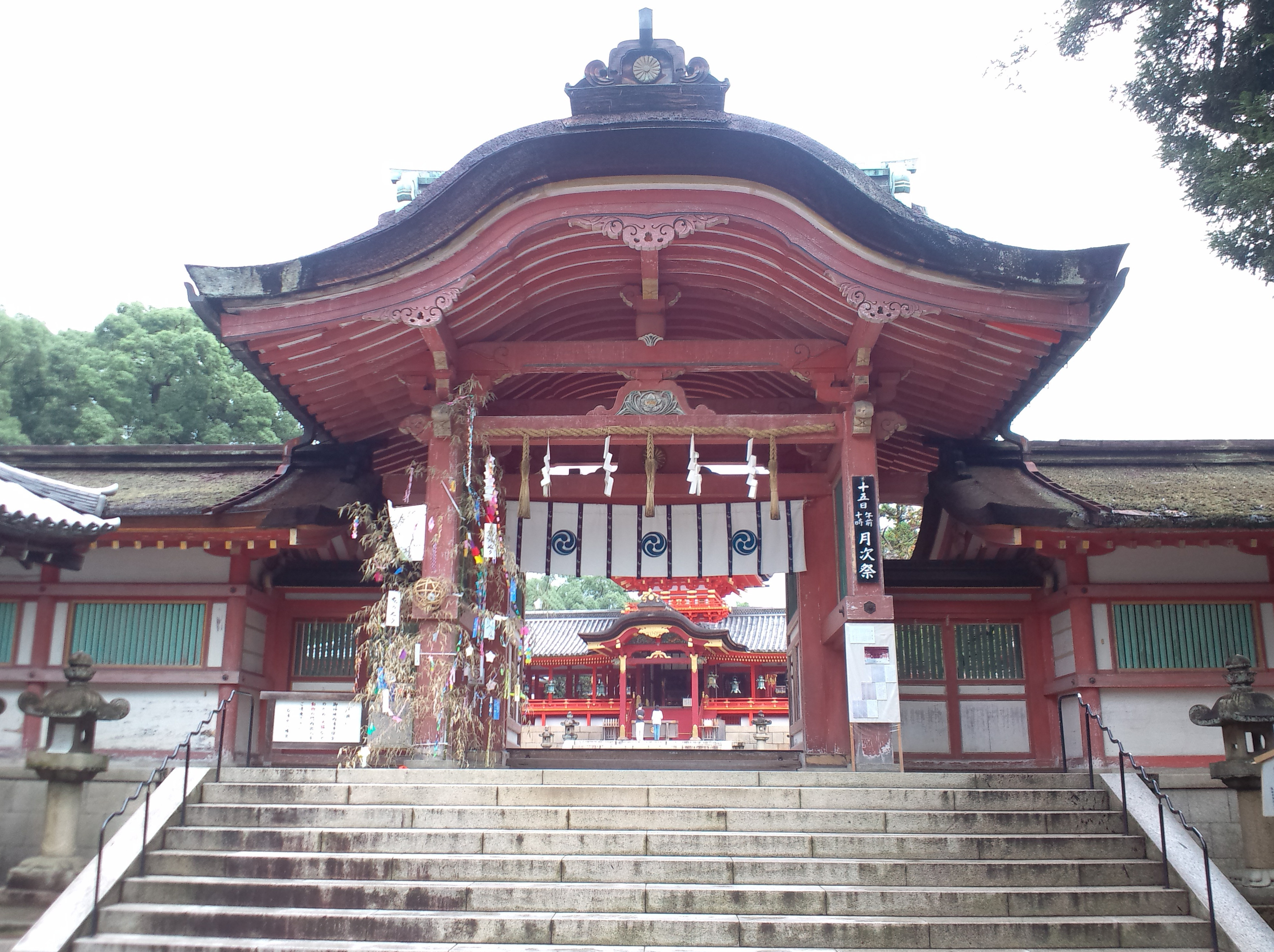 石清水八幡宮（南総門）